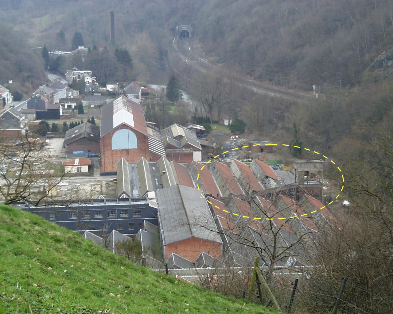 Vue prise en 2004 de ce qui reste de l'usine Imperia de Nessonvaux (Belgique). Dans l'ellipse en jaune, on aperçoit un bout de la piste d'essais construite en 1928 avec le château d'eau au virage. Photo perso J. THURION (Belgavox)